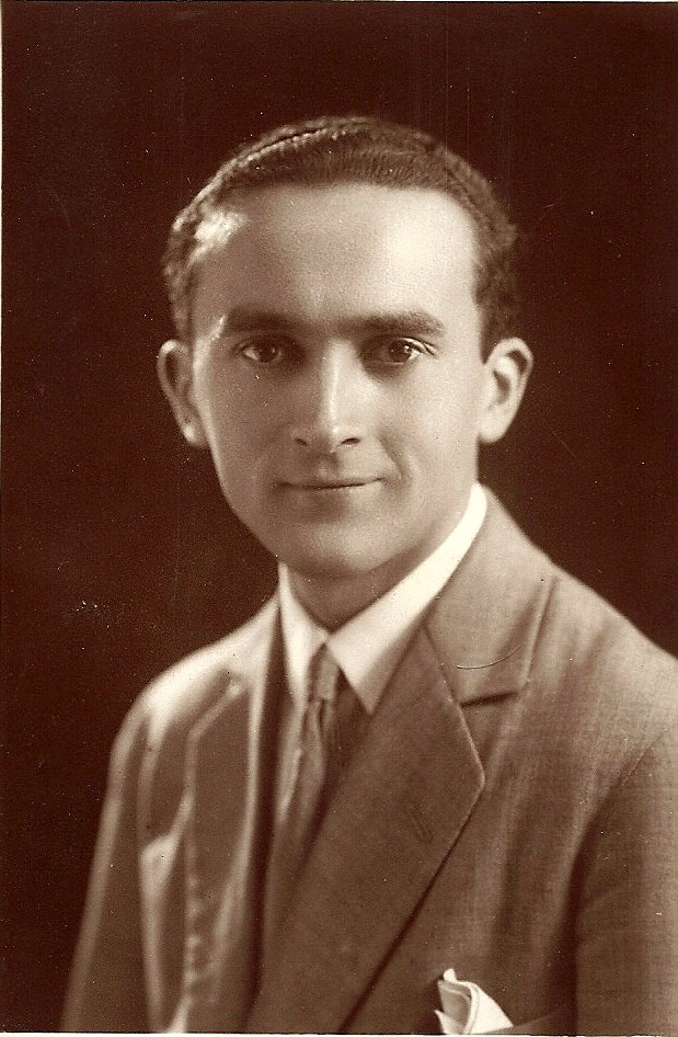 François de Vial Prague 1933